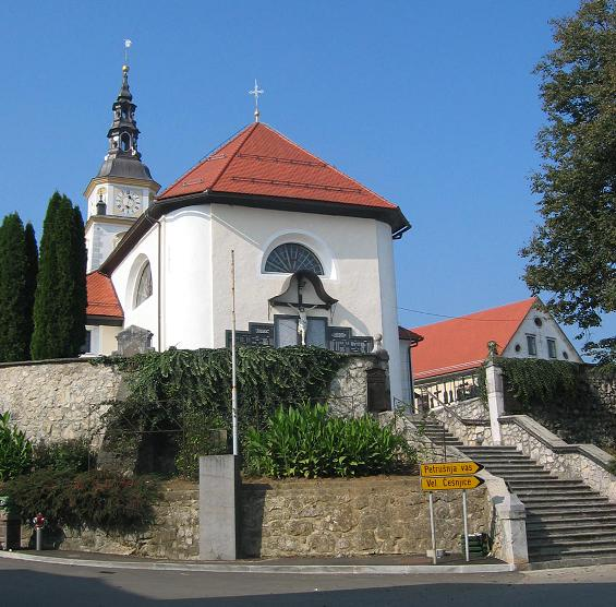 Šentvid pri Stični.